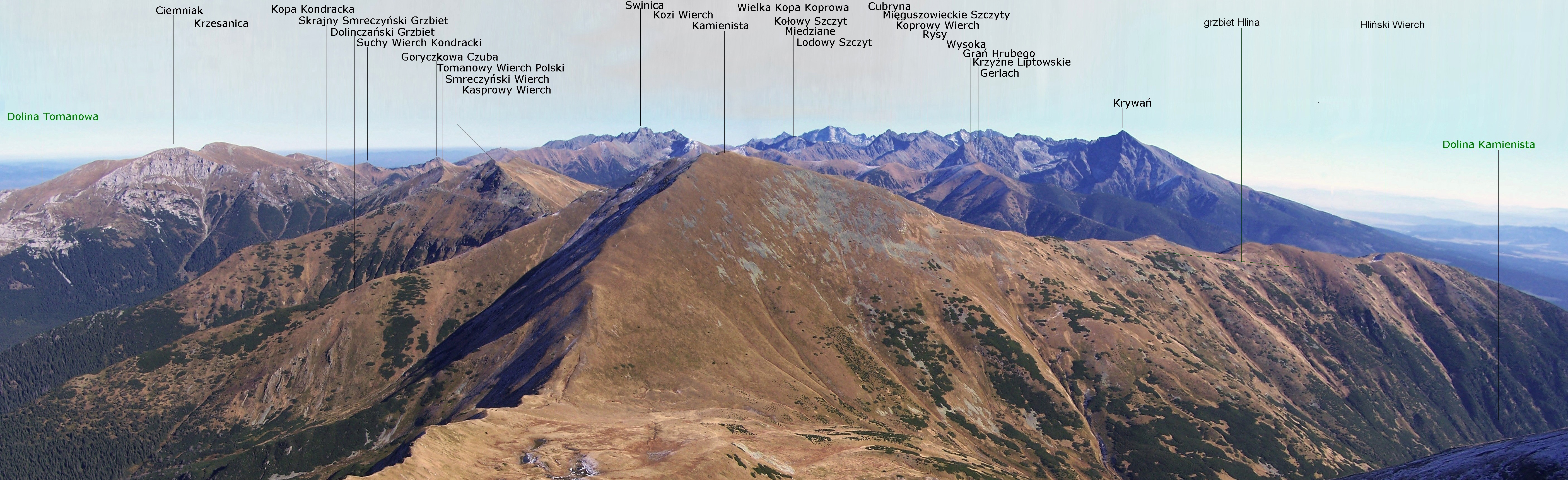 Widok we wschodnim kierunku z Błyszcza